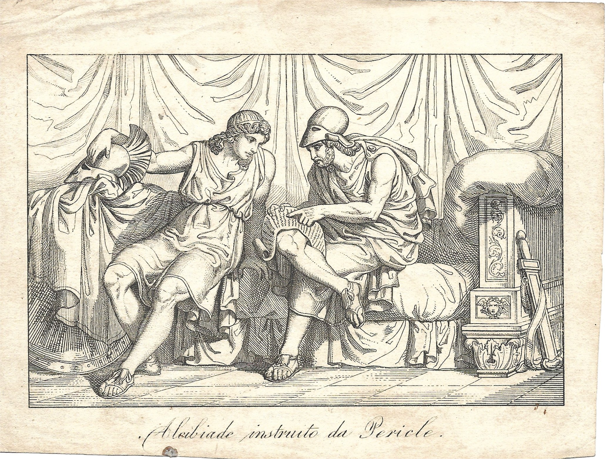 Alcibiade istruito da Pericle